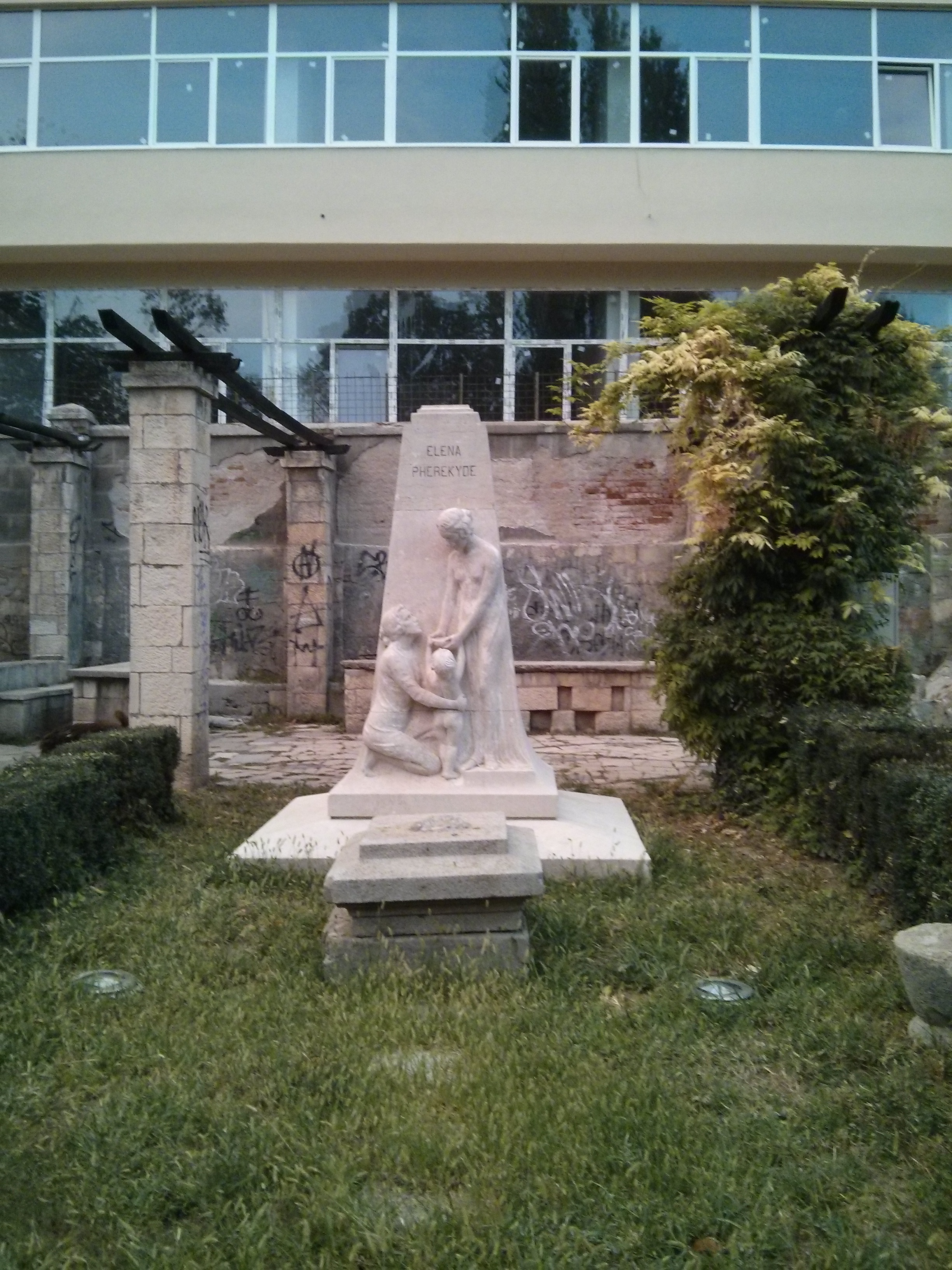 Monumentul Elenei Pherechide